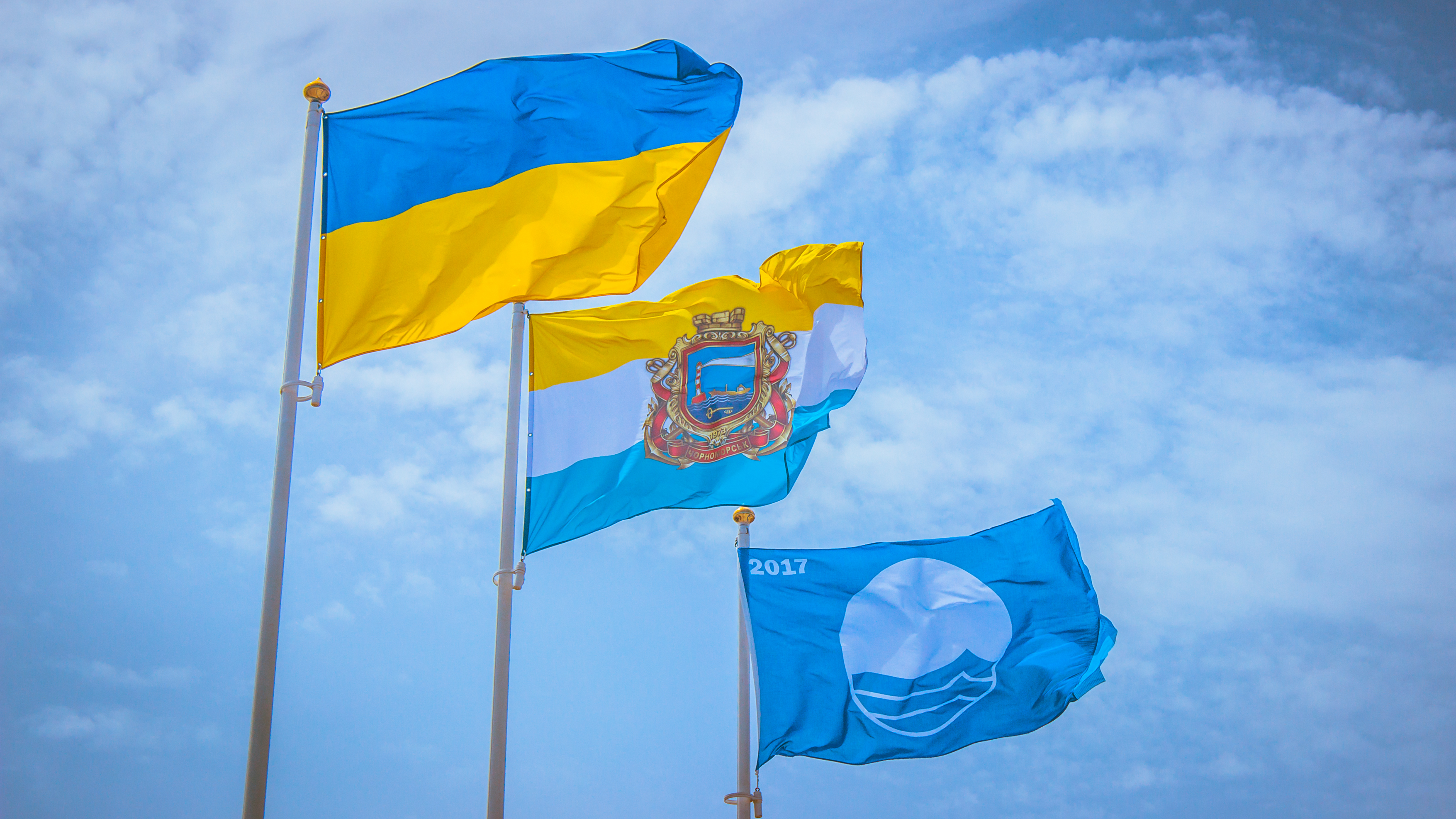 Голубой флаг на центральном городском пляже Черноморска.